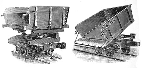 Wagonnets girafe du catalogue Decauville